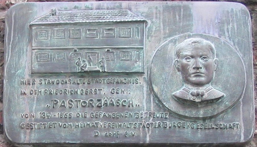 Düsseldorf, Schulstraße 04 (Pastor-Jääsch-Plakette). Hier stand das alte Stadtgefängnis, in dem Friedrich Gerst, gen. „Pastor Jääsch“, von 1841-1865 die Gefangenen betreute. Gestiftet vom Heimatverein Altstädter Bürgergesellschaft D dorf e. V.